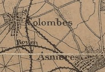 Carte pratique des environs de Paris. [1 : 1 200 000 environ]. Gravé par L. Sonnet